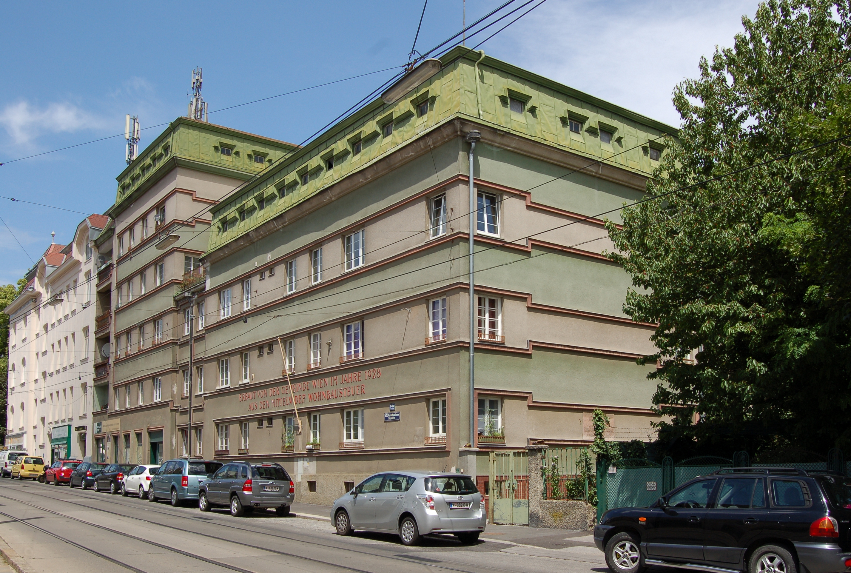 Die denkmalgeschützte Wohnhausanlage Dornbacher Straße 84a in Wien-Hernals. Der Gemeindebau entstand 1928 nach Plänen von Walter Raschka.